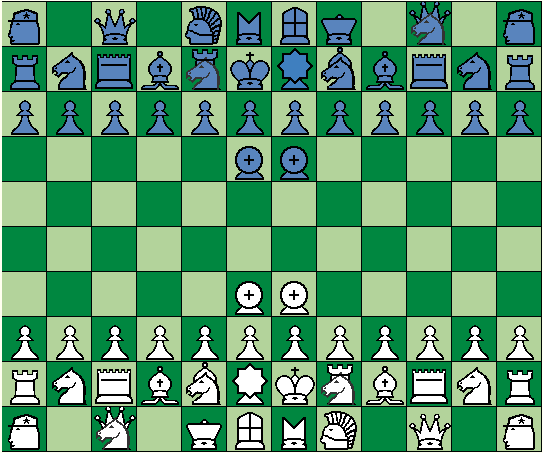 Ajedrez renacentista o Ajedrez de renacimiento combina las piezas ortodoxas con un numero considerable de piezas mágicas como el zorro, el caballero, el guardia, el principe o la ardilla.